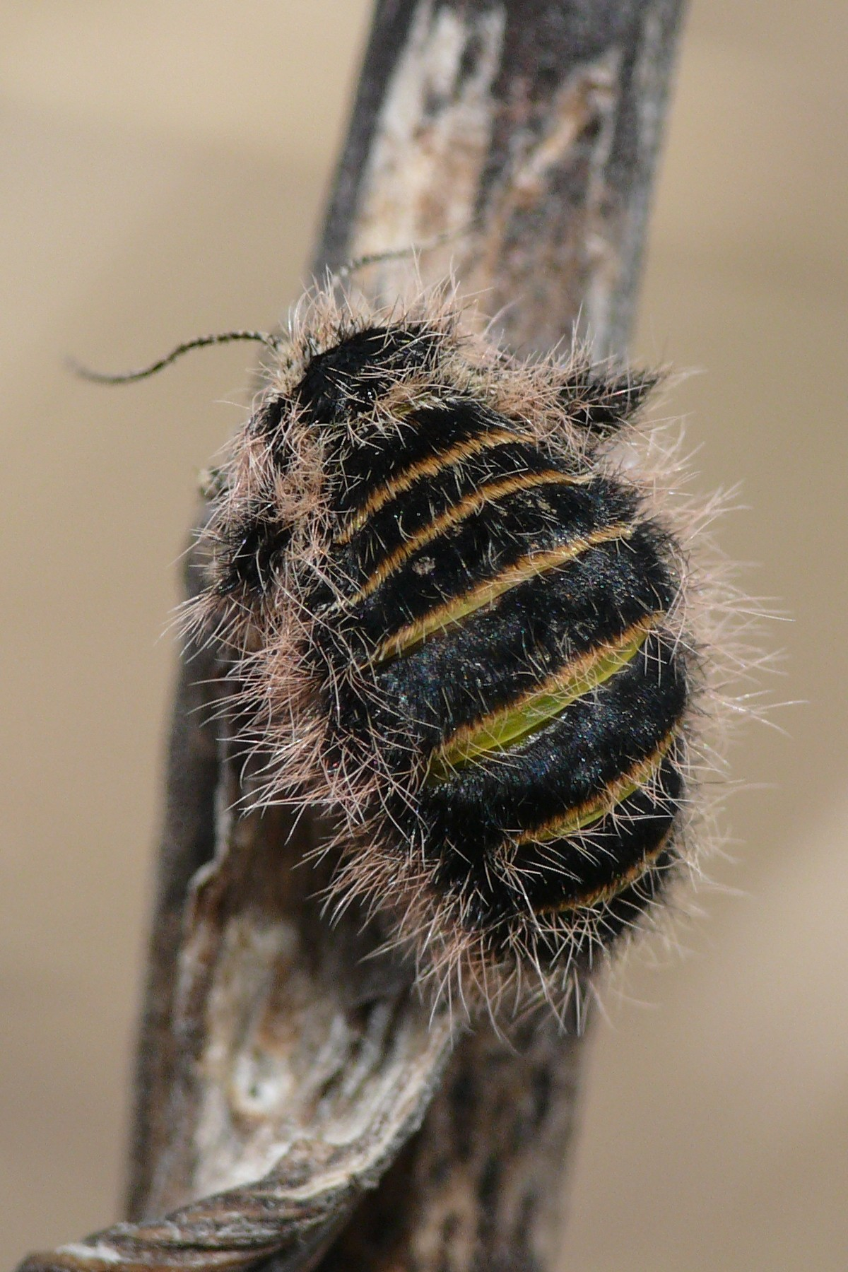 Weibchen des Trockenrasen-Dickleibspanners (Lycia zonaria), Münchner Umland